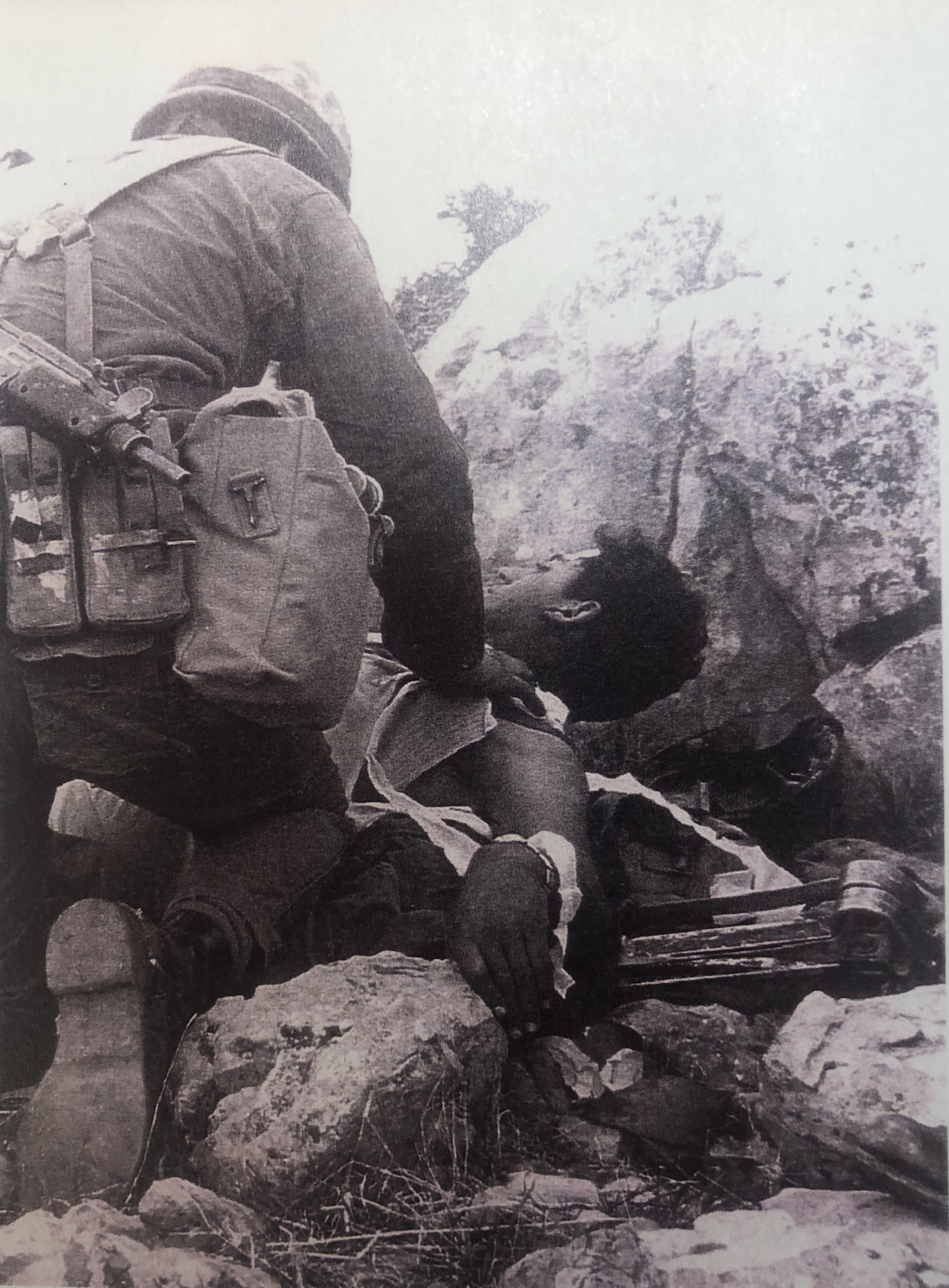 טיפול בפצוע תחת אש. תמונה שצולמה במהלך הקרב